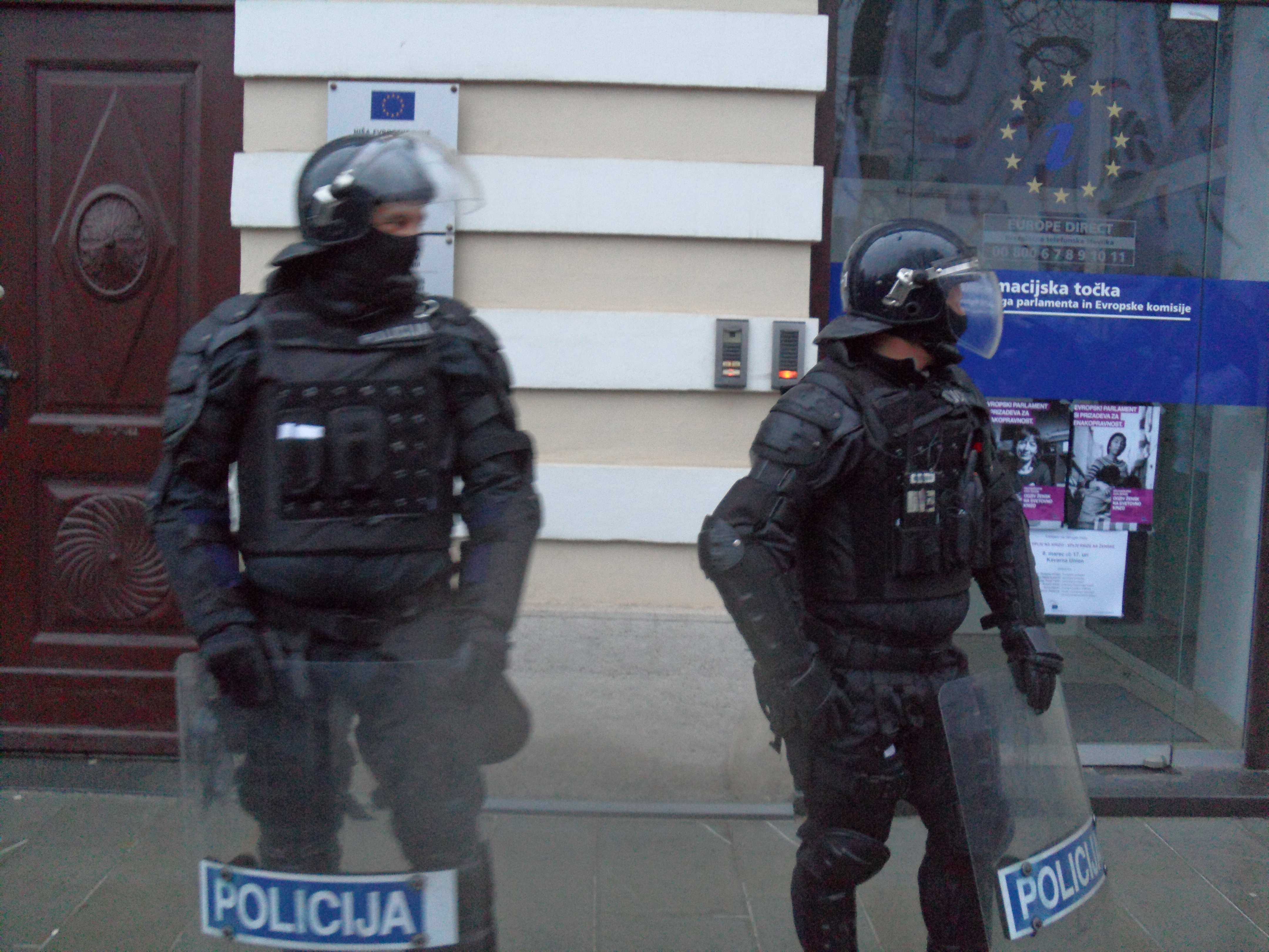 Na četrti vseslovenski vstaji se je zbralo okoli 5000 ljudi. Kot je poudaril odbor Vseslovenske ljudske vstaje, je osnovna zahteva protestnikov, odstop političnih elit, ostala neizpolnjena. Protestniki so zato v obliki t.i. Pomladne deklaracije vseslovenske ljudske vstaje zahtevali razpis predčasnih volitev v roku šestih mesecev od imenovanja prehodne vlade, na čelu prehodne vlade pa osebo z nesporno moralno integriteto. Prav tako so zahtevali instrument ljudske nezaupnice in radikalno reformo sodstva, pa tudi takojšnje in učinkovito sojenje vsem, ki so do premoženja prišli na sporen način, in tudi, da bankirji prevzamejo odgovornost. Zahtevali so tudi prenovo Slovenije, ki bo temeljila na morali in socialni pravičnosti, večji vpliv ljudi na to, kdo bo sedel v DZ skozi preferenčni glas ter ustanovitev ustavne komisije, ki bo vključevala državljane in uveljavila potrebne spremembe v ustavi.